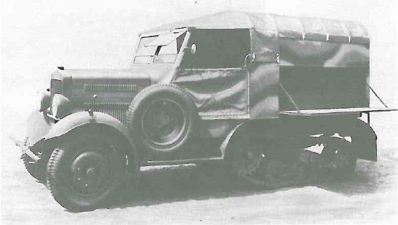 Samochód wz. 34 z nadwoziem warsztatowym. [opis oryginalny]